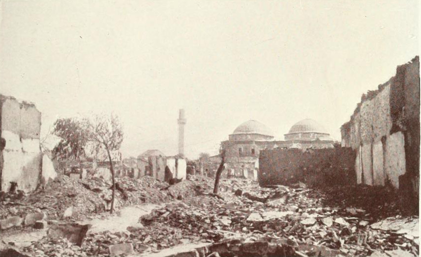 Vista de Seres, arrasada por los búlgaros en retirada durante la Segunda Guerra Balcánica.